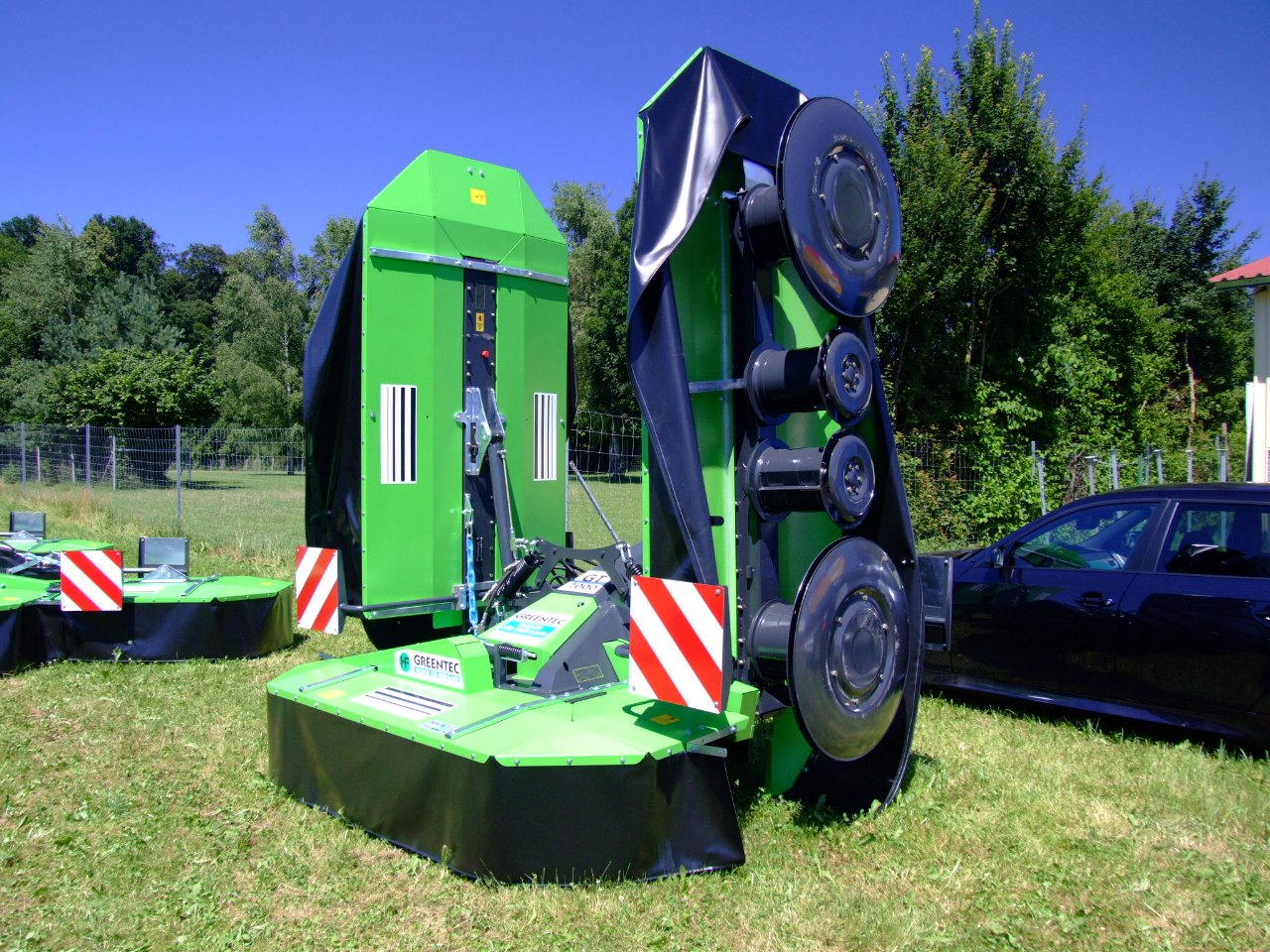 Deutz-Fahr-Trommelmäher GT 7000, dreiteiliges Großmähwerk in Transportstellung